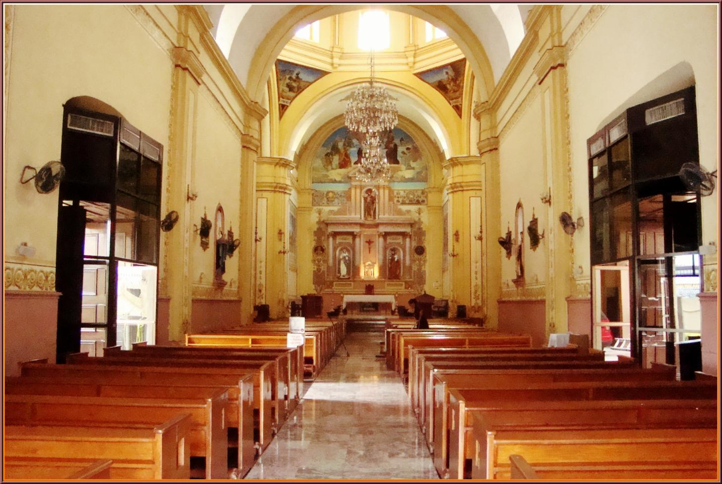 By Catedrales e Iglesias Album 2619